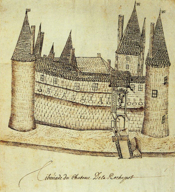 Ansicht der Burg La Rochepot in Burgund